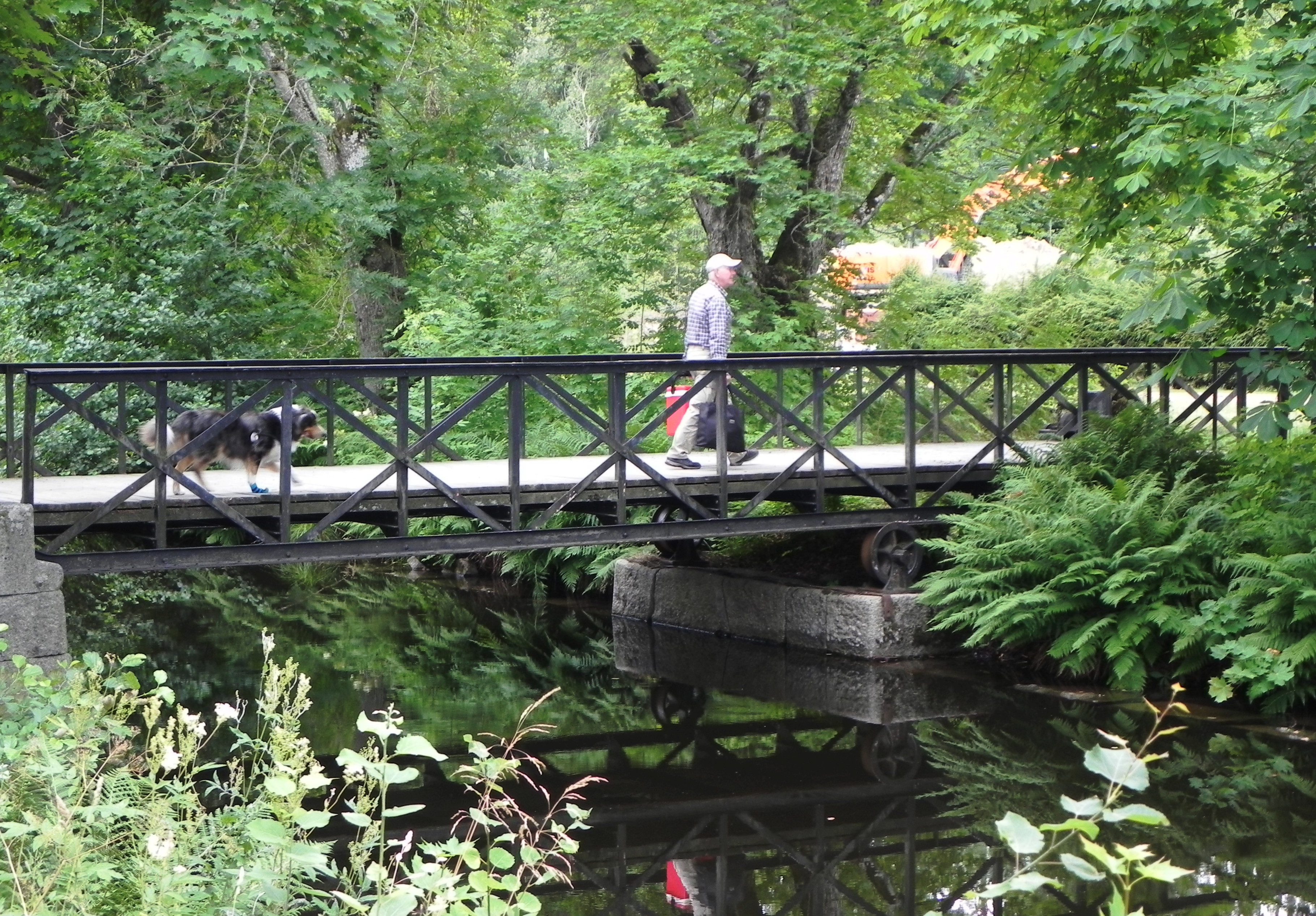 Trångforsområdet, skjutbro över Strömsholms kanal